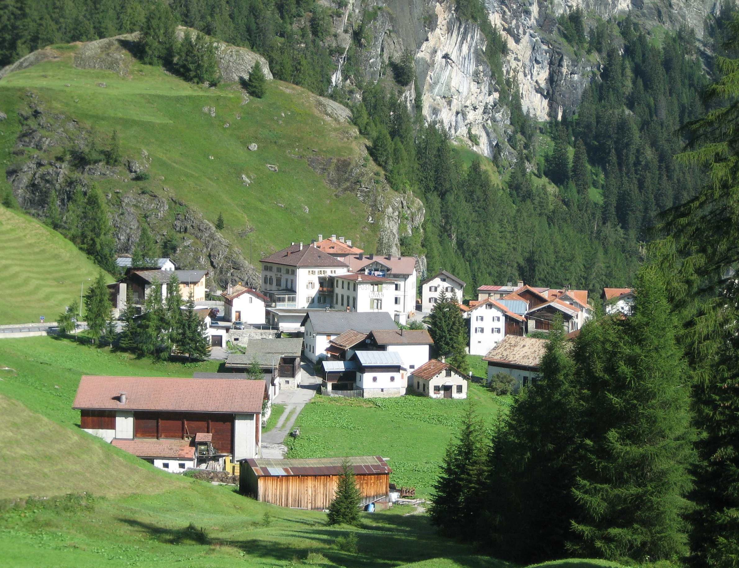 Mulegns